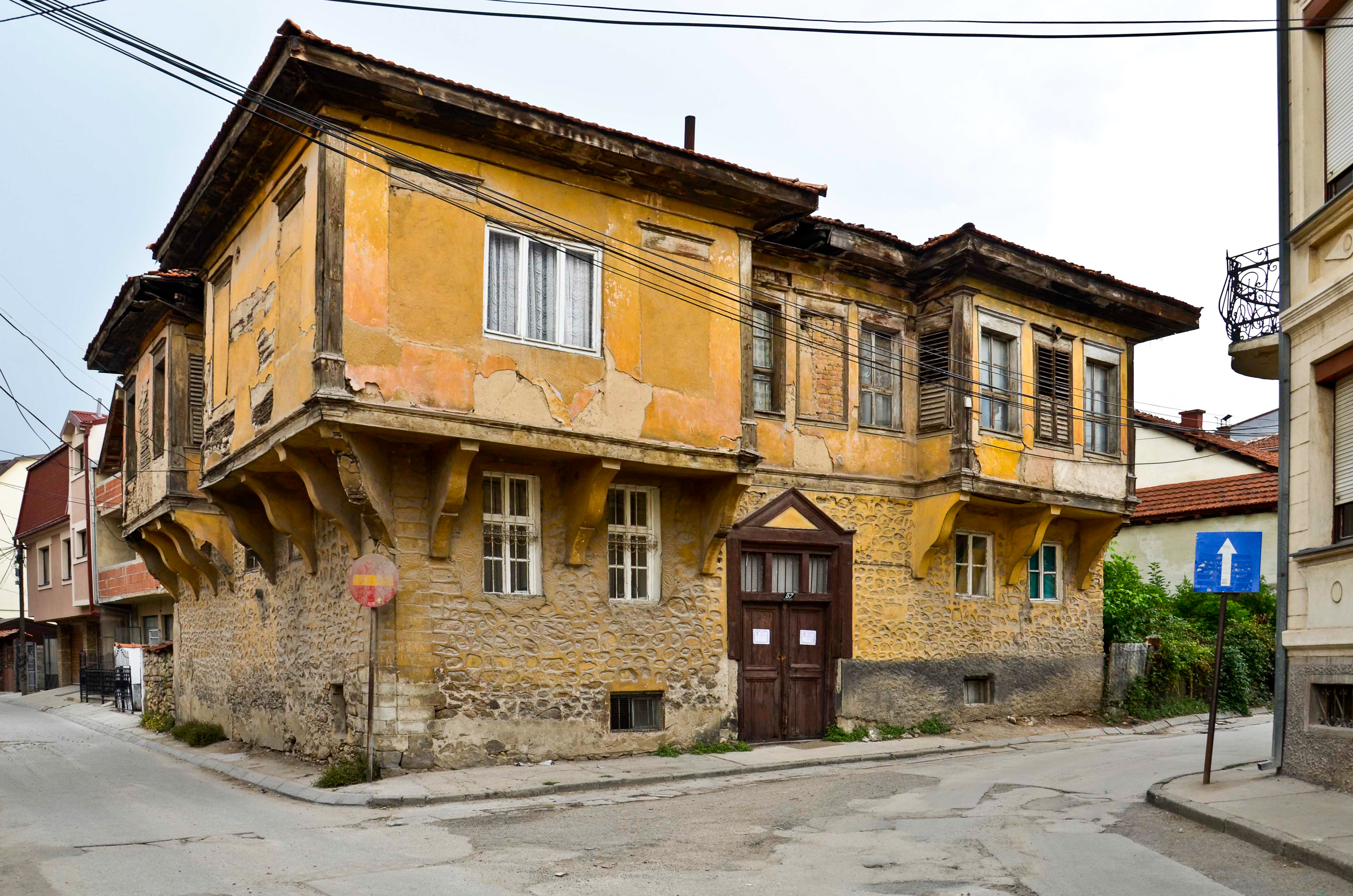 Градска архитектура, Битола